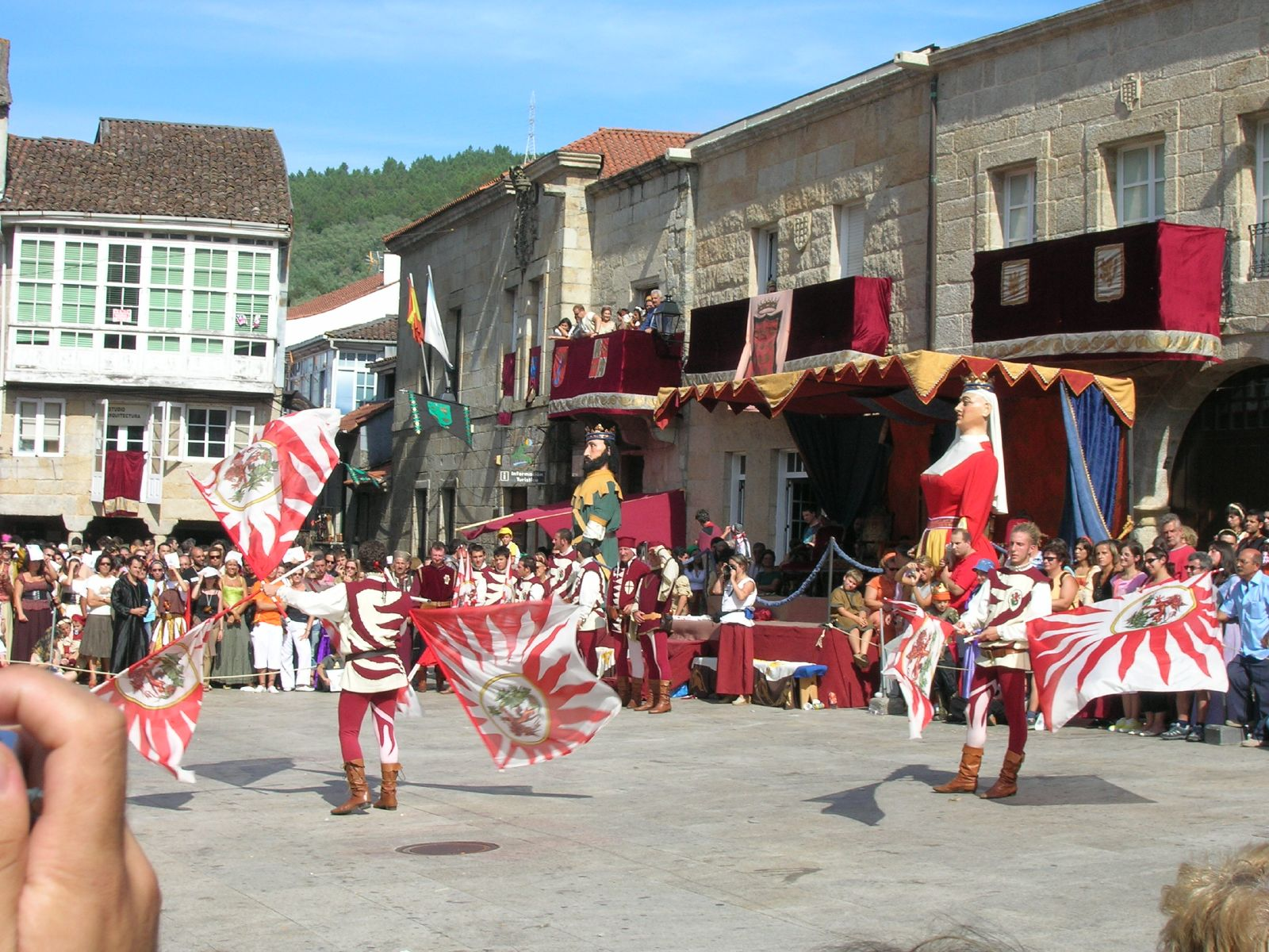 Gruppo Storico "Sbandieratori Città di Volterra".